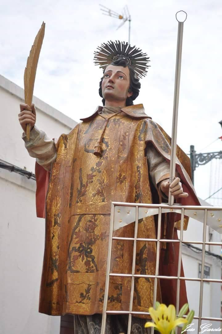 Imagen de San Lorenzo, Patrón Principal de la Parroquia y del Pueblo que lleva su nombre. Siglo XVII. Autor anónimo.